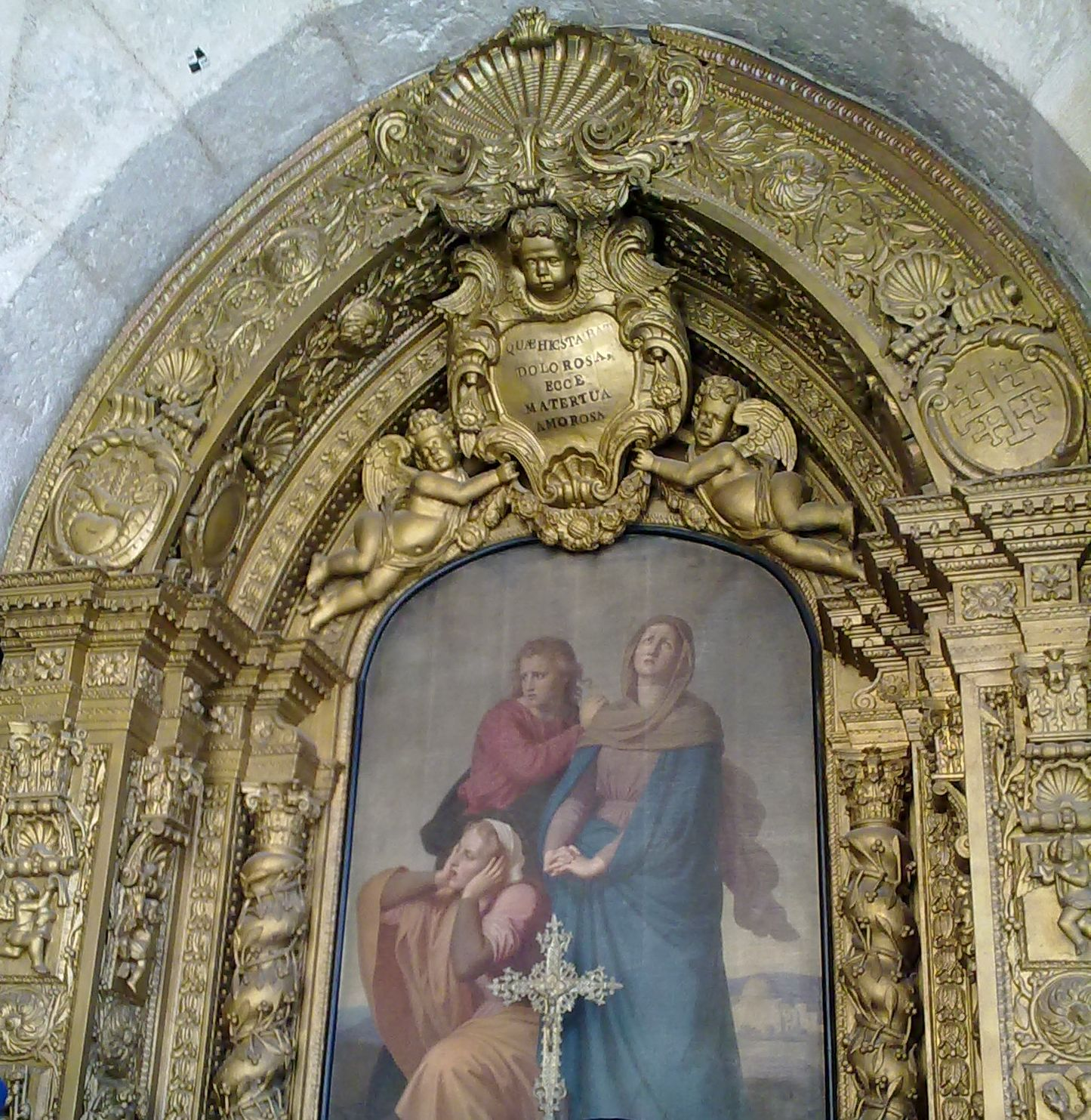 קפלת הפרנקים בכנסיית הקבר